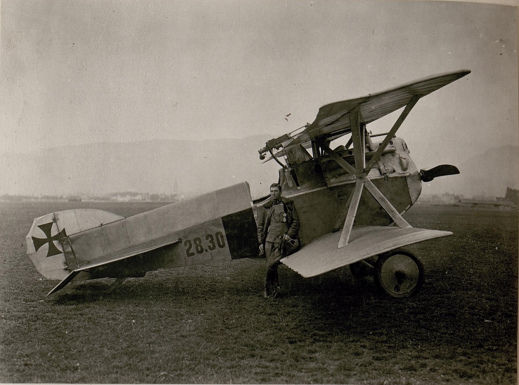 Hptm.R.Stoisavljevic mit Kampfeinsitzer. (14/9.1917.)